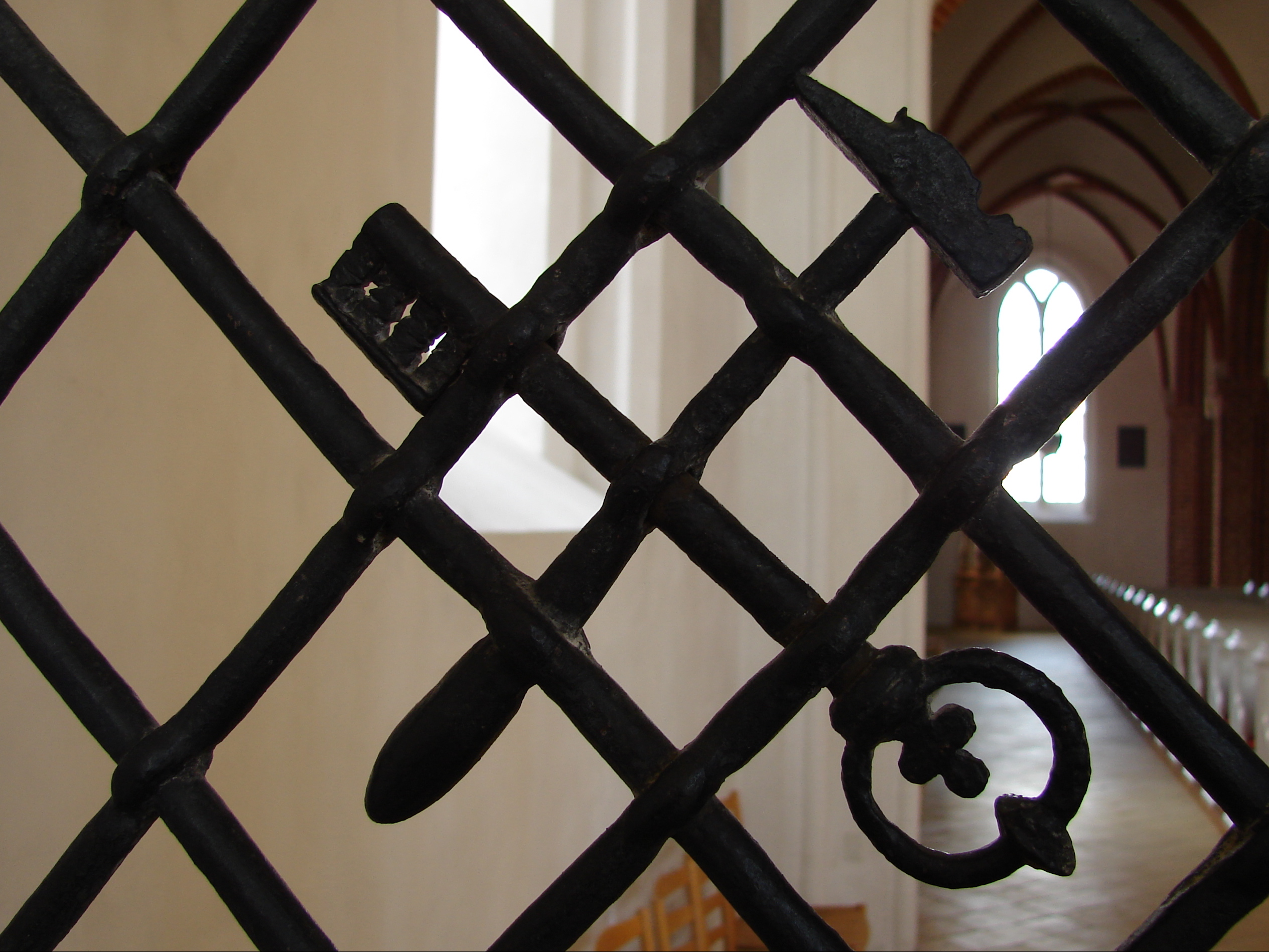 Caspar Finckes bomærke fra gitterport i Vor Frue Kirke, Nyborg, Fyn